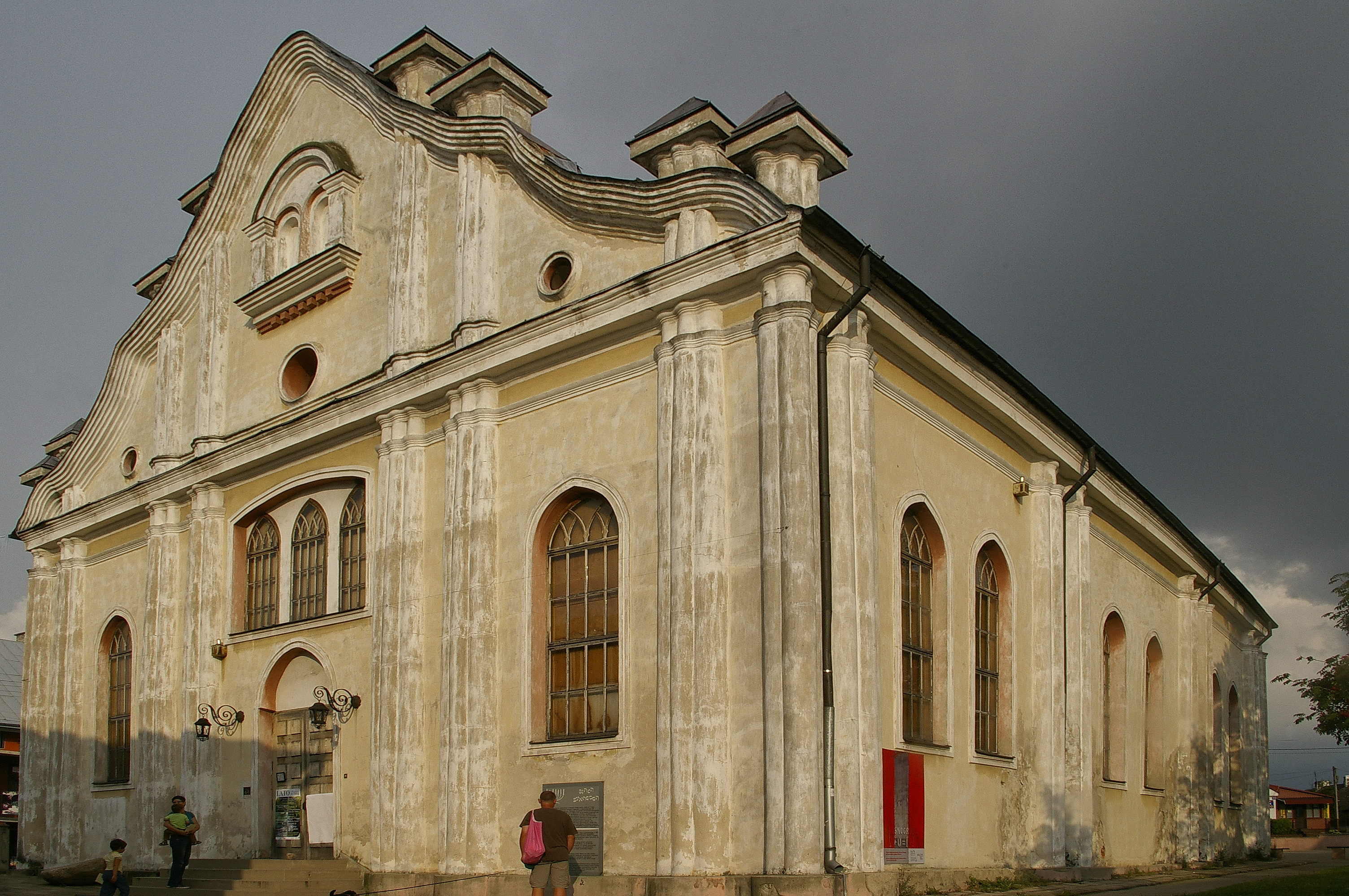 Biała Synagoga w Sejnach